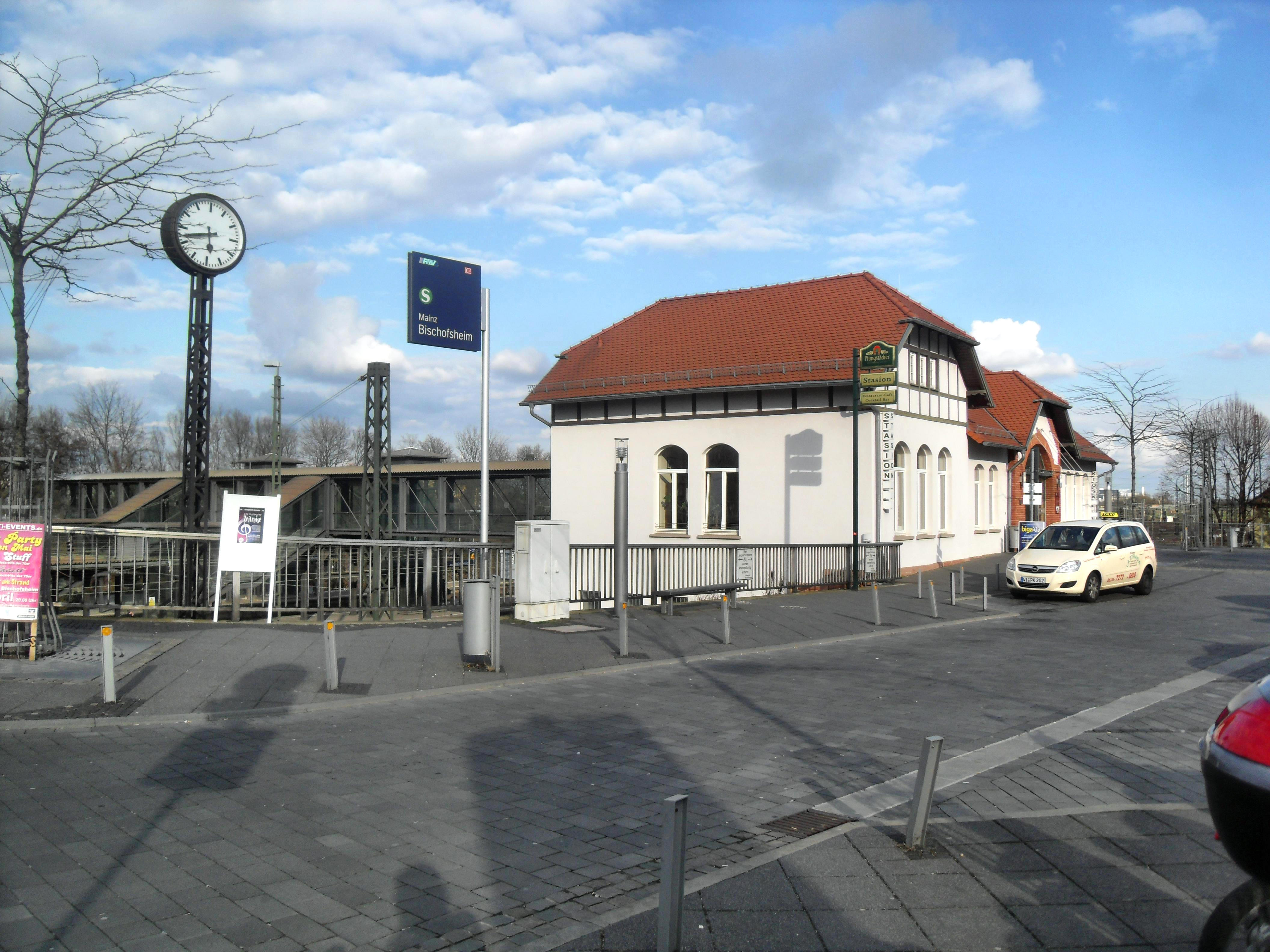 Empfangsgebäude des Mainz-Bischofsheimer Bahnhofes